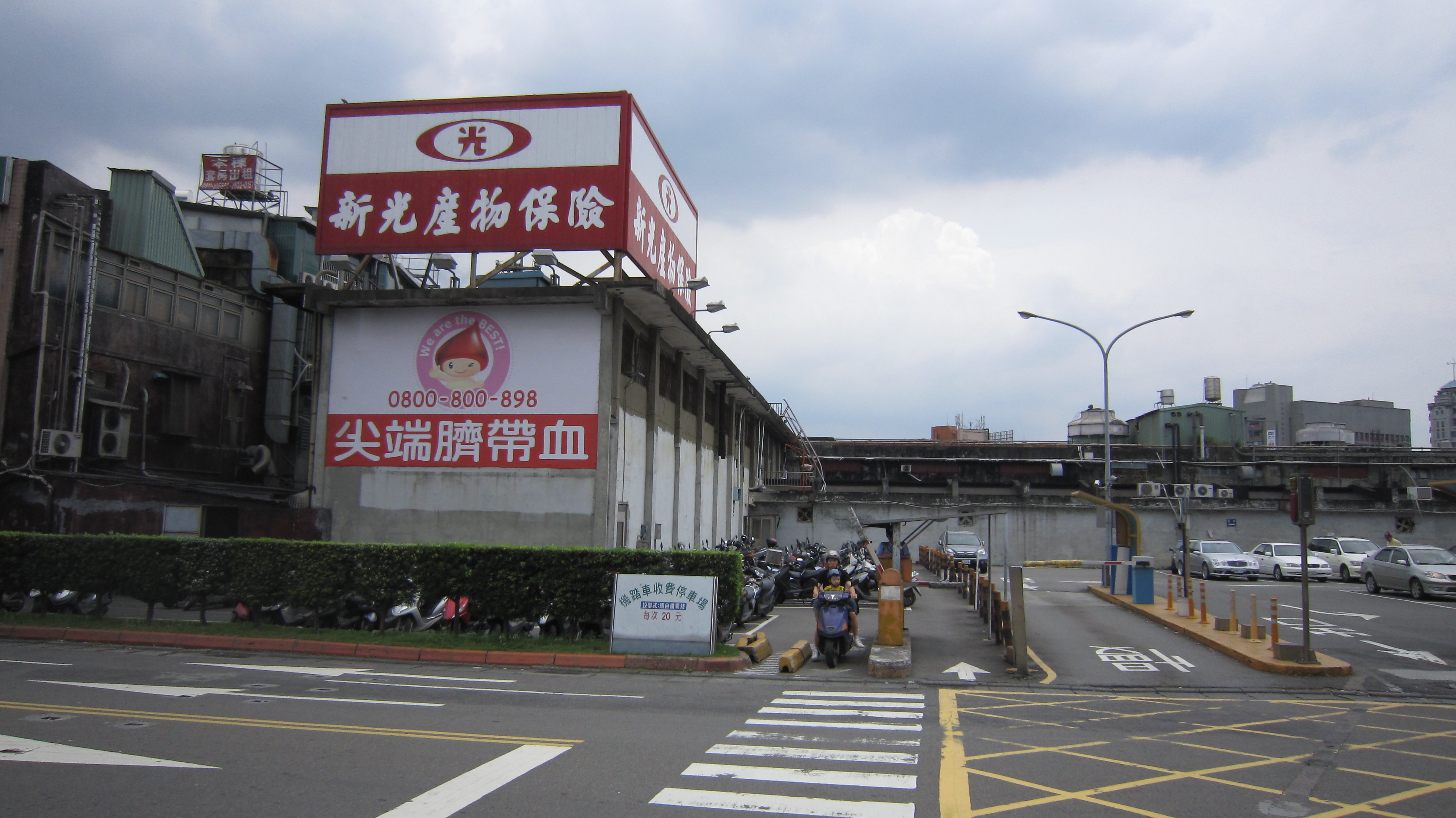 中文（台灣）: 新光吳火獅紀念醫院停車場機車入口處，新光產物保險與尖端臍帶血廣告。